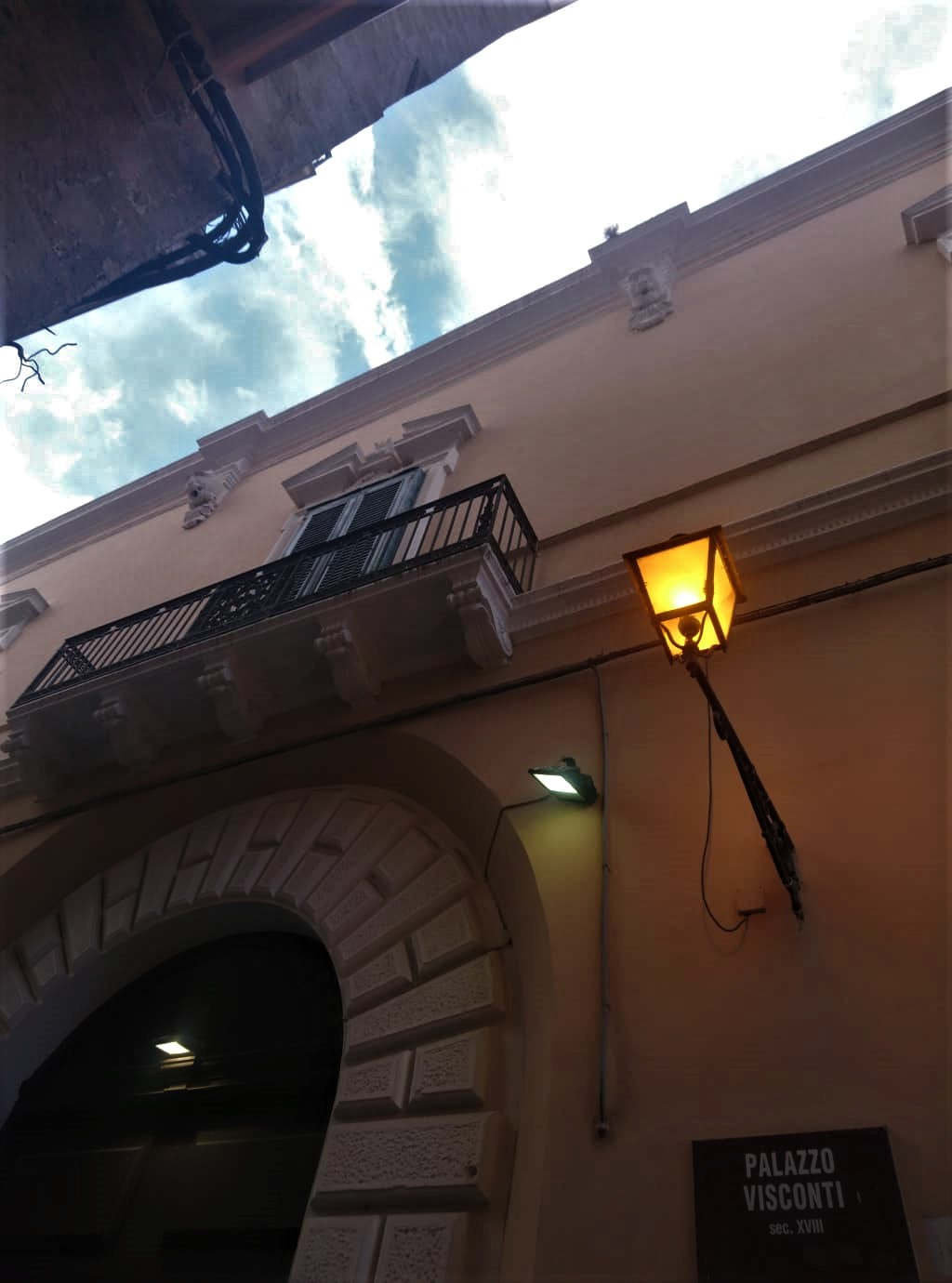 Palazzo Visconti di Taranto